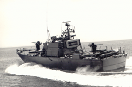 ספינת דבור בים האדום יתכן 867